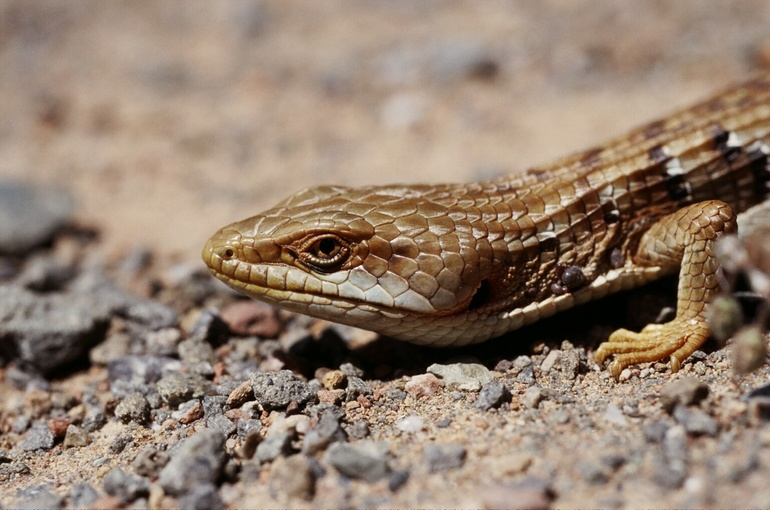 Elgaria multicarinata